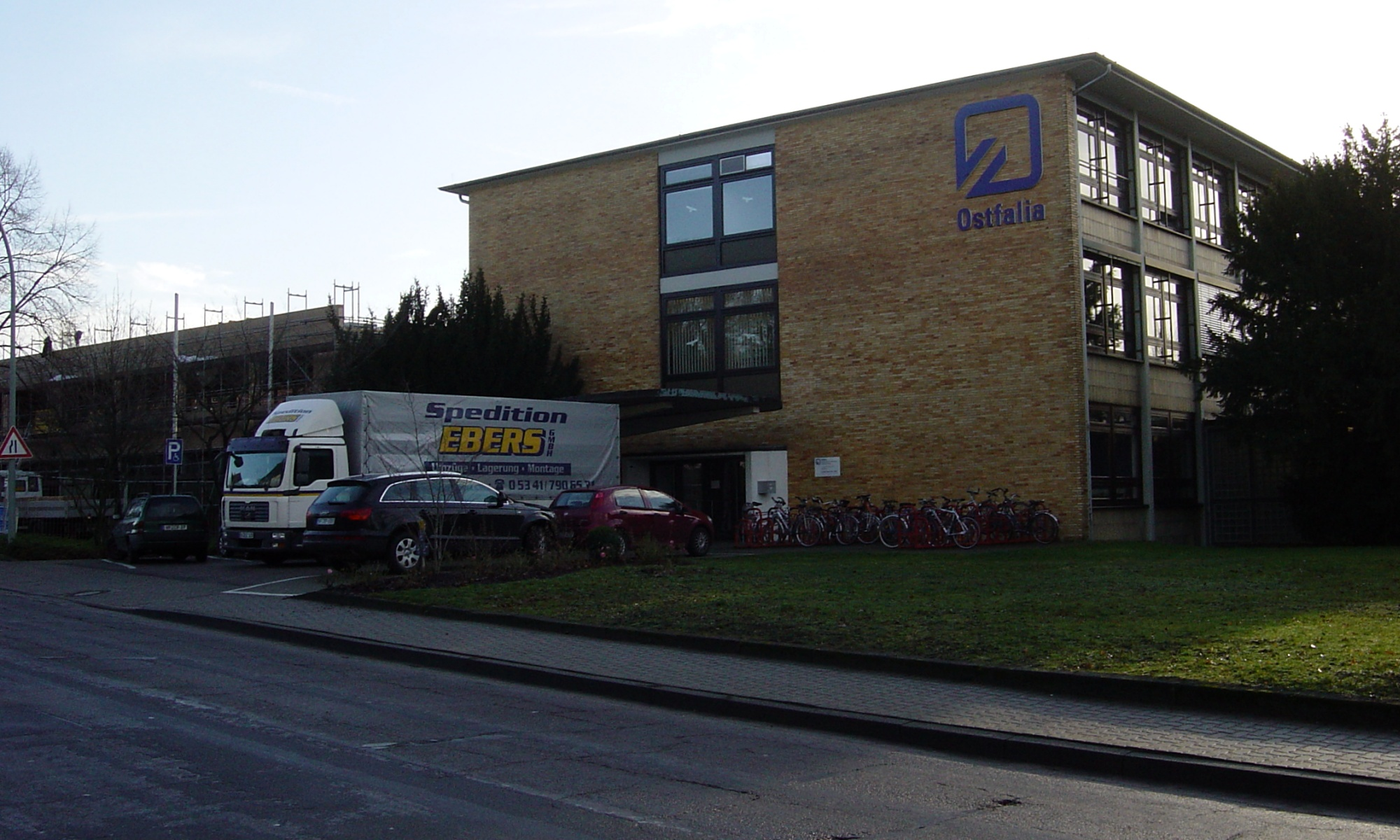 Ostfalia Hochschule für angewandte Wissenschaften, Fachhochschule Braunschweig/Wolfenbüttel, Salzdahlumer Str. 46, 38302 Wolfenbüttel